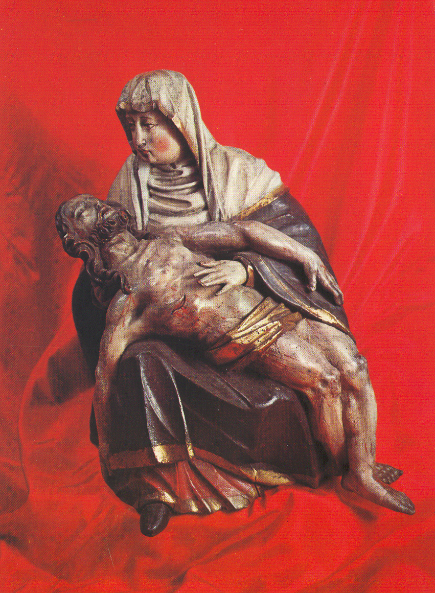 La statue de la Vierge de Dusenbach - Pietà du XVe siècle